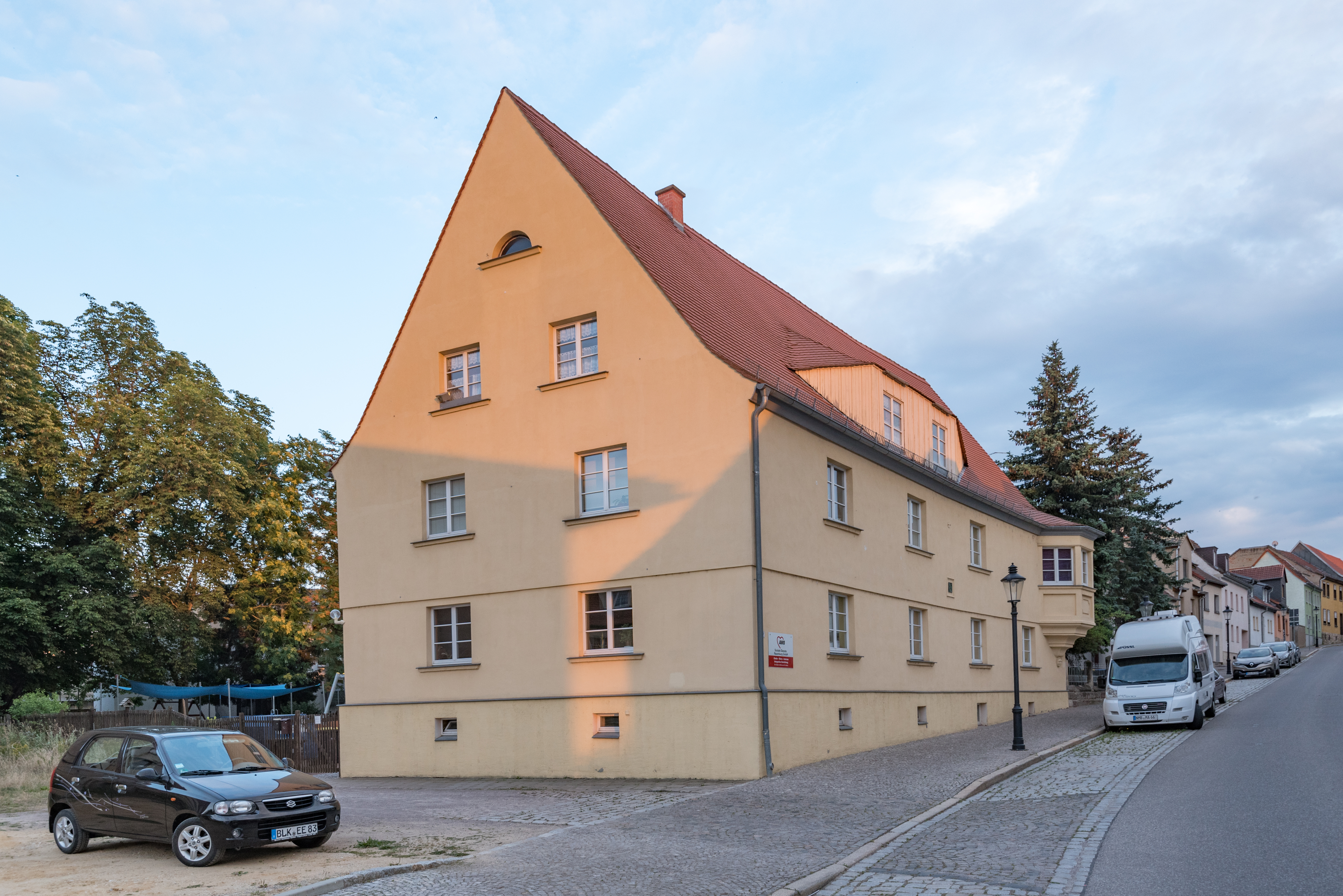 Naumburg (Saale), Moritzberg 12